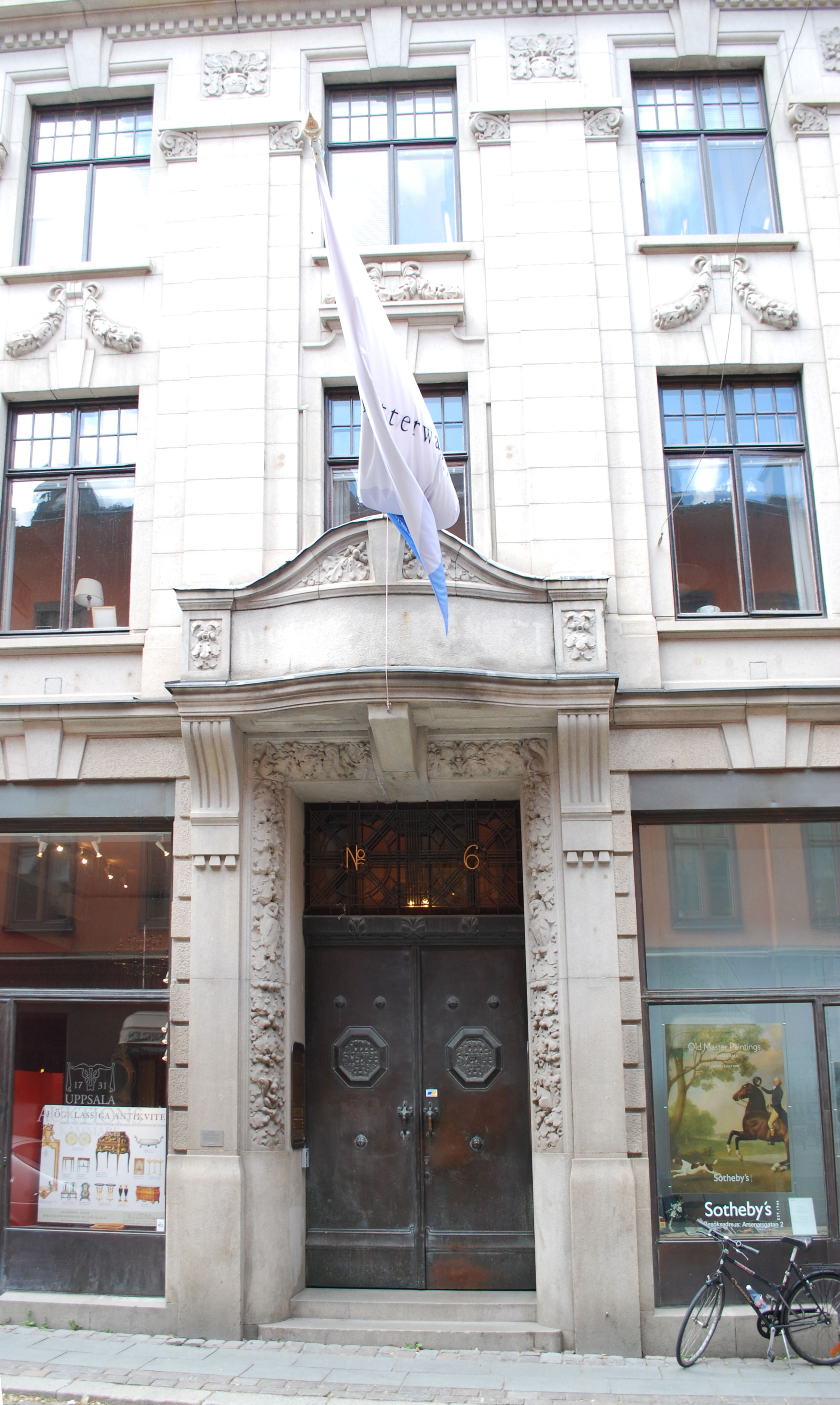 Arsenalsgatan 6